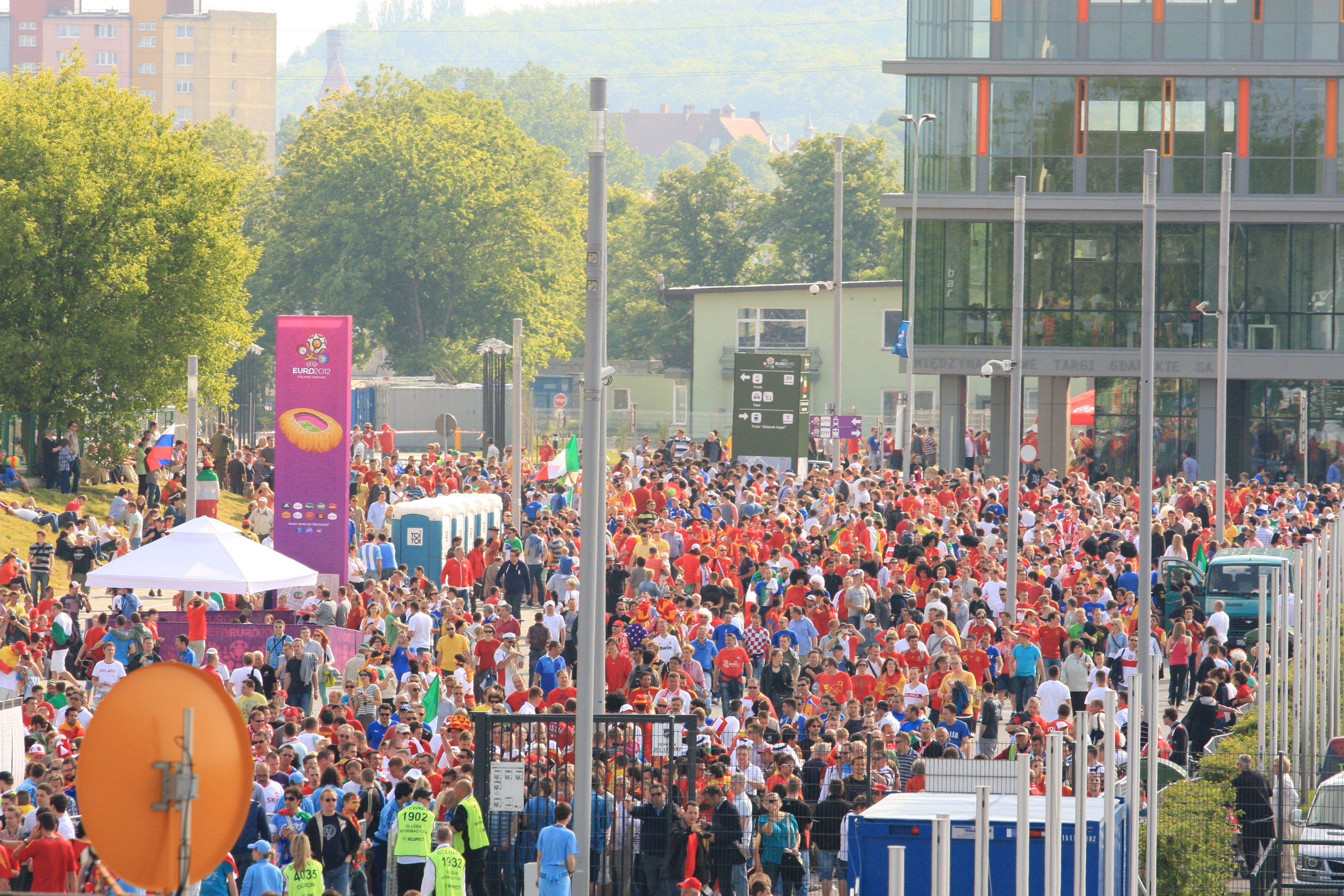 UEFA Euro 2012